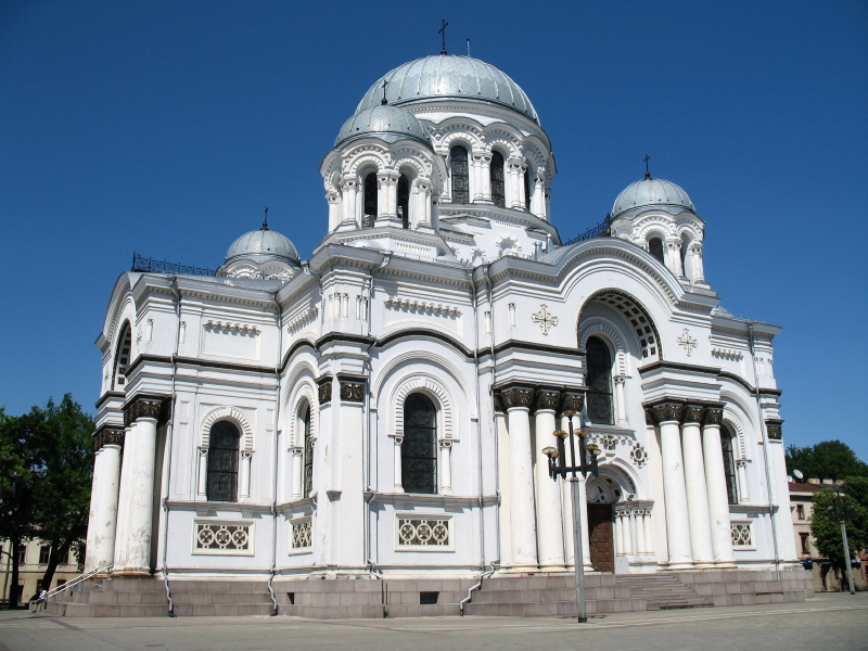 Šv. arkangelo Mykolo (Įgulos) bažnyčia, Kaunas.